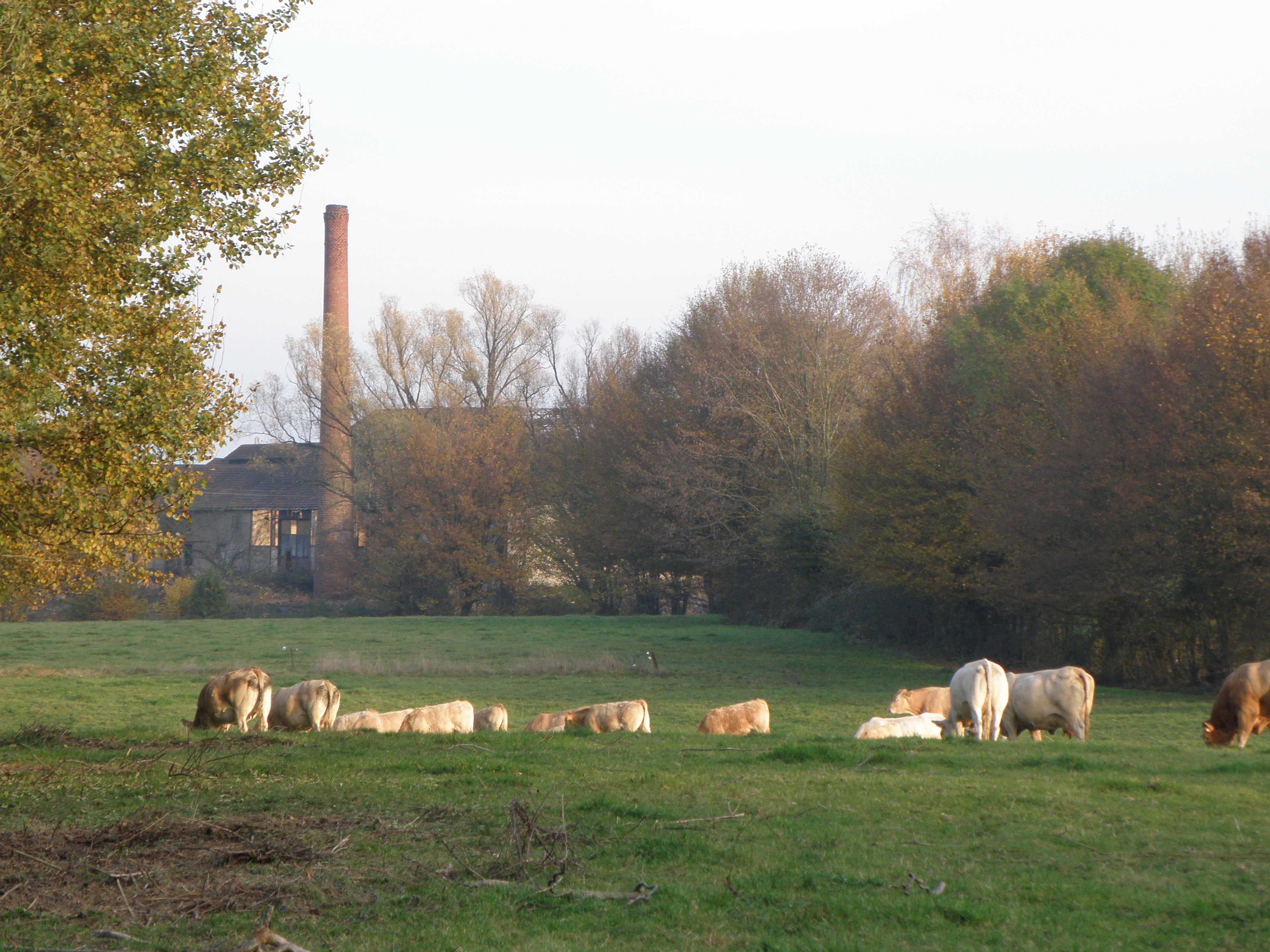 Cette photo témoigne d'une activité actuelle (l'élevage) et d'une activité passée (ici la cheminée de la verrerie blanche).